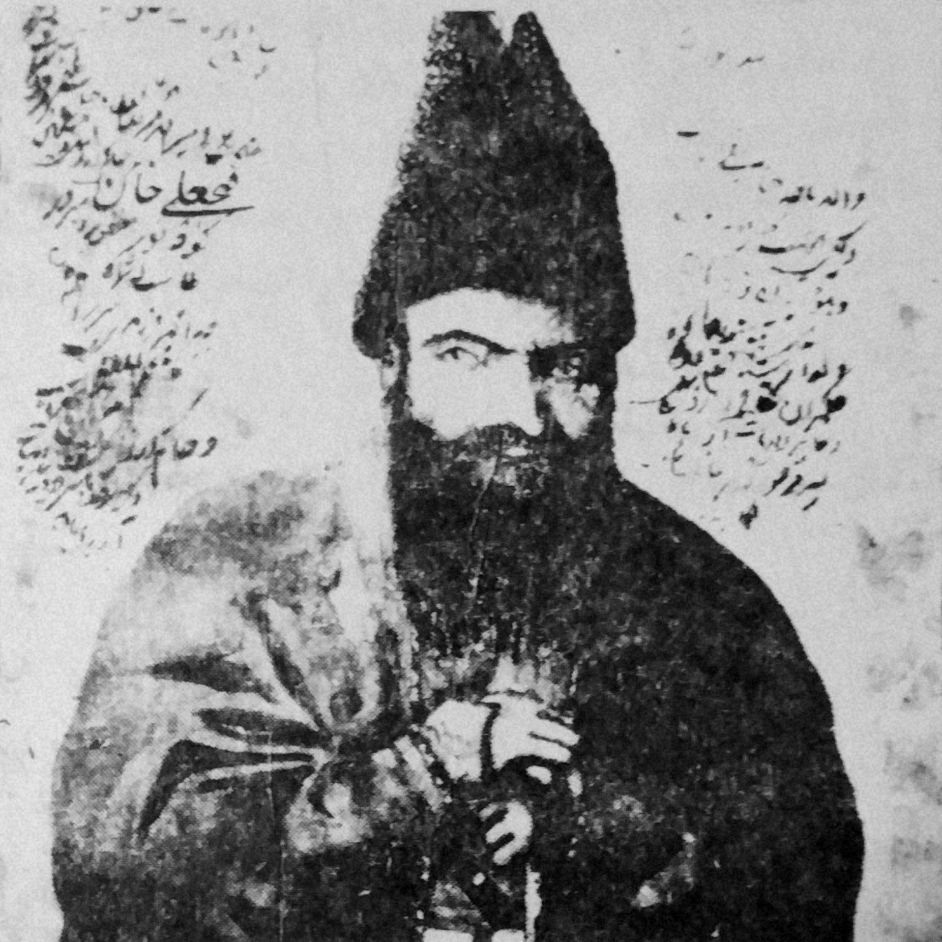 فتحعلی خان کوه نور، قوریساول باشی و وزیر بهمن میرزا